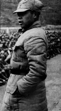 1940年5月，陈锡联同志任一二九师三八五旅旅长时，在“百团大战”前作战斗动员